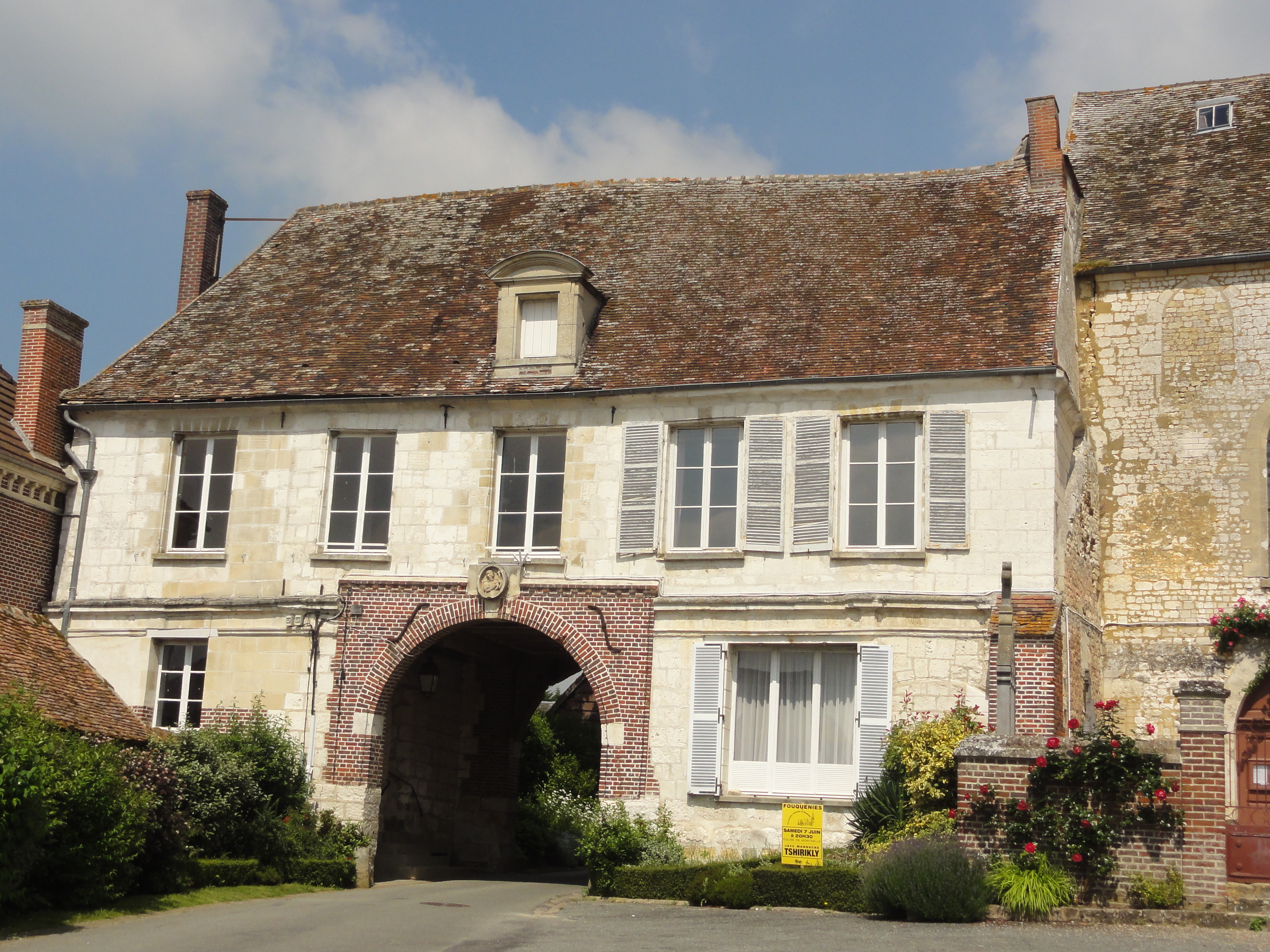 Ancien prieuré de Montmille, à l'ouest de l'église Saint-Lucien.